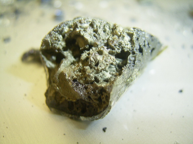 Im Labor hergestelltes Eisensulfid, die äußeren Glasränder sind vom Reagenzglas